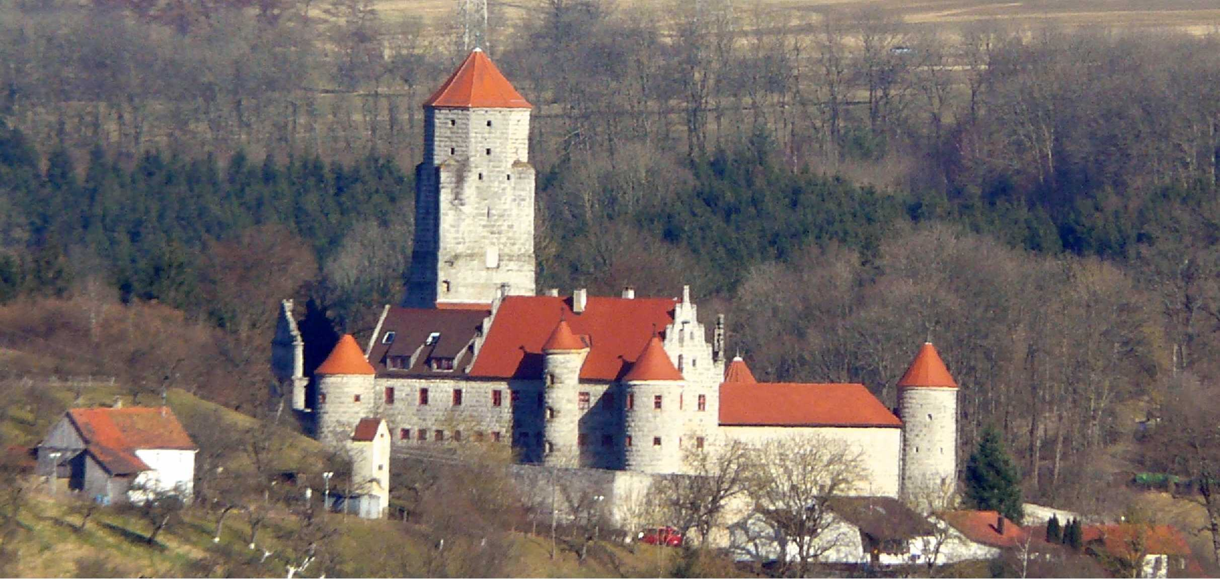 Die Marienburg in Niederalfingen von Aalen-Fachsenfeld aus fotografiert